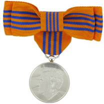 Inhuldigingsmedaille 2013, damesmodel, voorzijde.